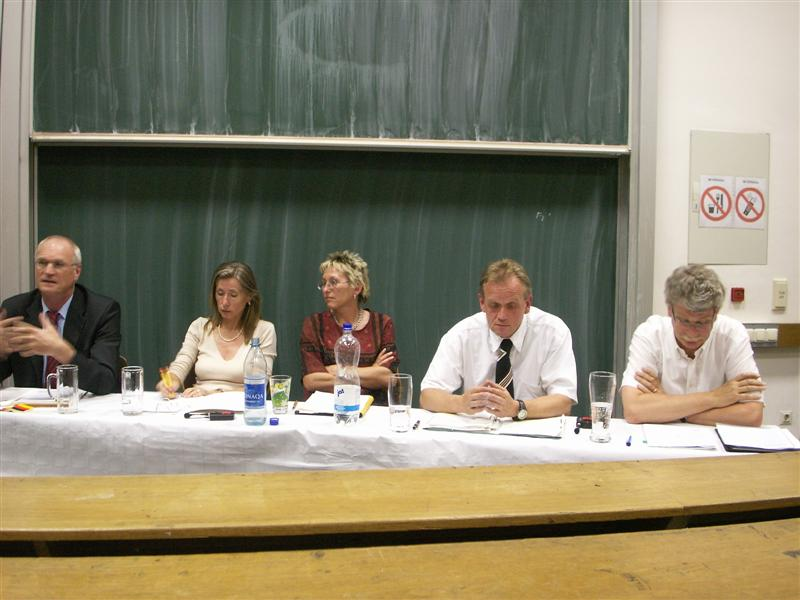 From left to right: Lothar Binding, Renate Rastätter, Eva Bulling-Schroeter, Dr. Peter Jahr, Hans-Michael Goldmann